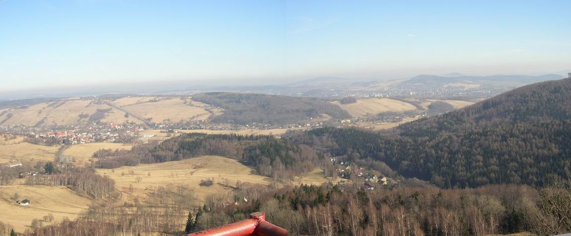 Pohled z Tolštejna na sever, vlevo Jiřetín pod Jedlovou, vpravo Varnsdorf